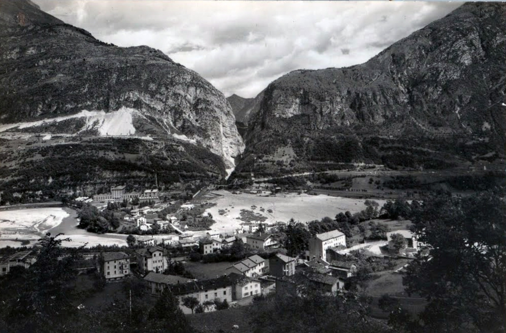 Panoramica della gola del Vajont vista da Longarone. In alto a sinistra si nota la nuova strada per la Valcellina, sotto la cartiera, con la borgata di Vajont del comune di Castellavazzo, e il vecchio ponte Campelli sul Piave. Appena sotto lo sbocco del t. Vajont sulla destra si nota, la cava di ghiaia nel greto del Piave e l'impianto a teleferica per il trasporto al'impianto di betonaggio nel cantiere diga.